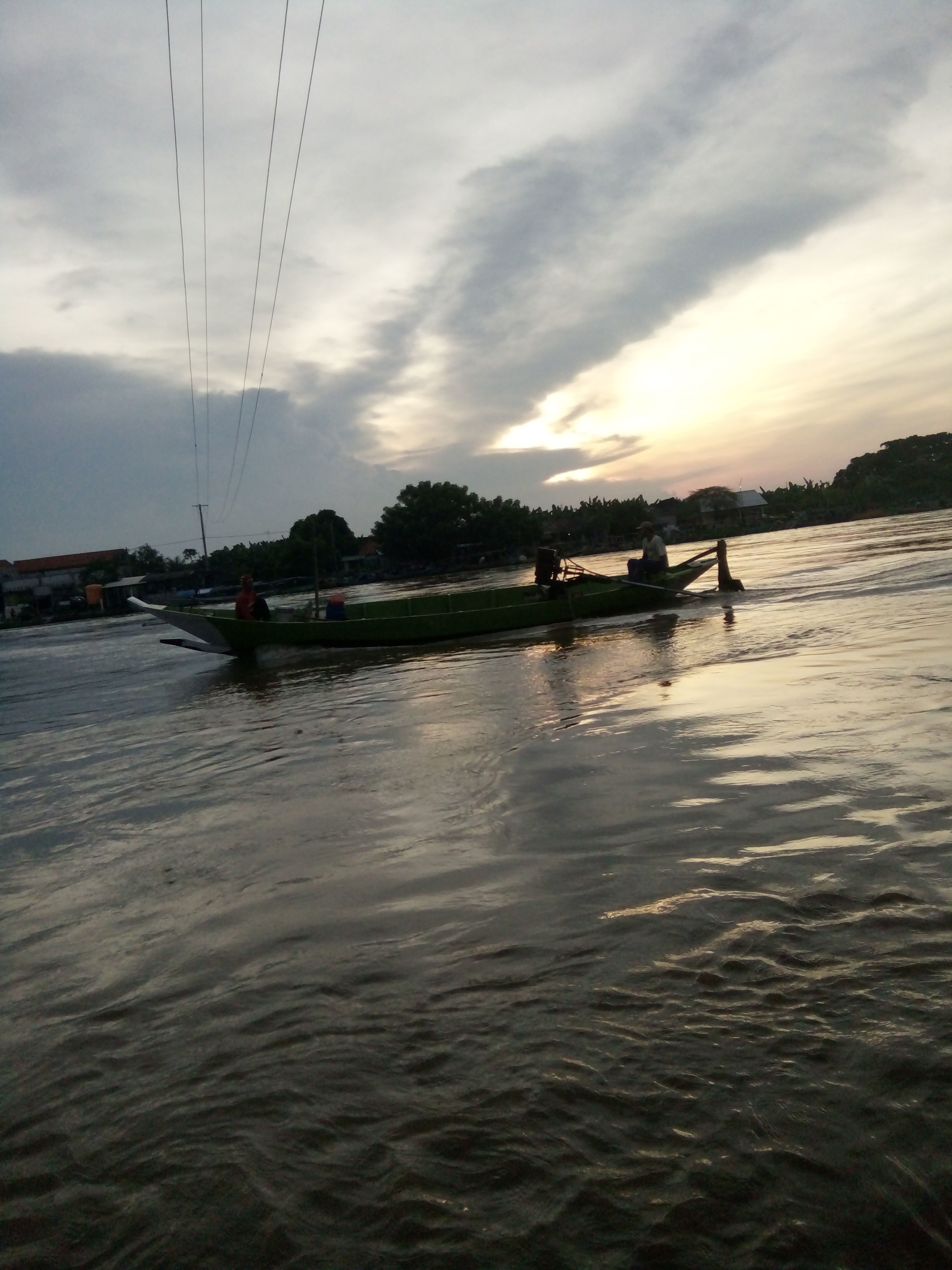 Menikmati senja di aliran Bengawan Solo yang terletak di Randuboto, Ujung Timur - Sidayu